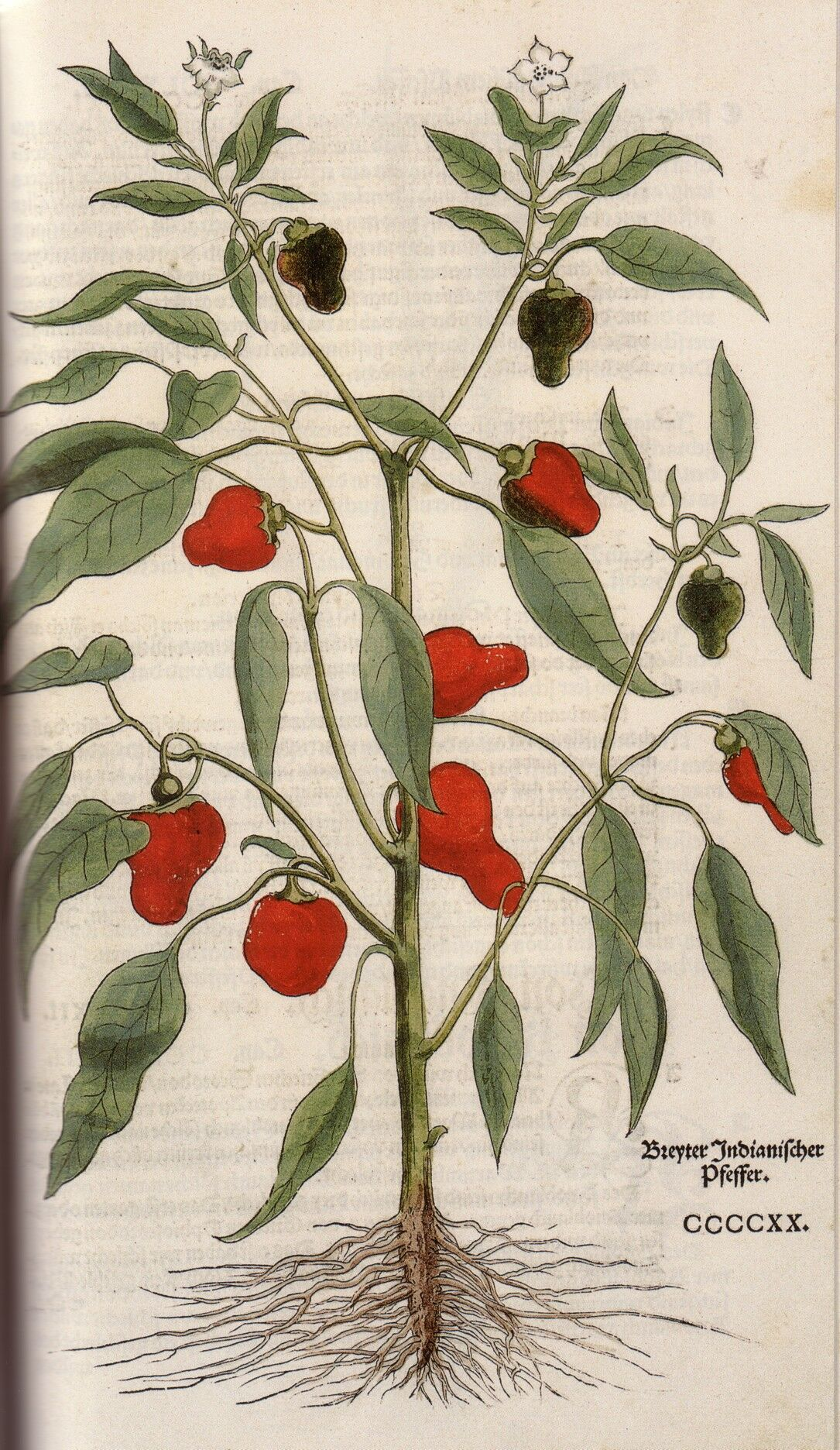 Breyter Indianischer Pfeffer = Capsicum annuum, Table CCCCXX